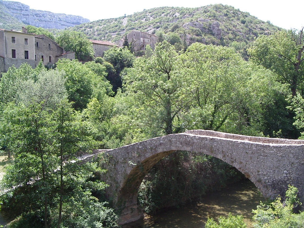 Pont sur la Vis à Navacelles (Hérault)